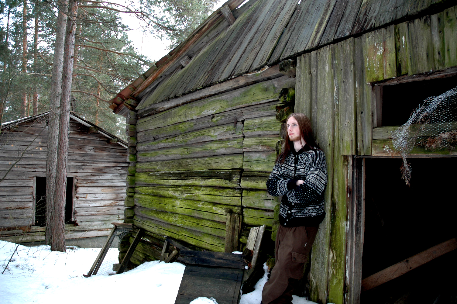 Lars Jensen from the folk metal-band Myrkgrav